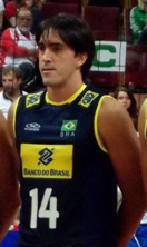 Zdjęcie zrobione podczas zawodów Ligi Światowej 2012 w katowickim Spodku.